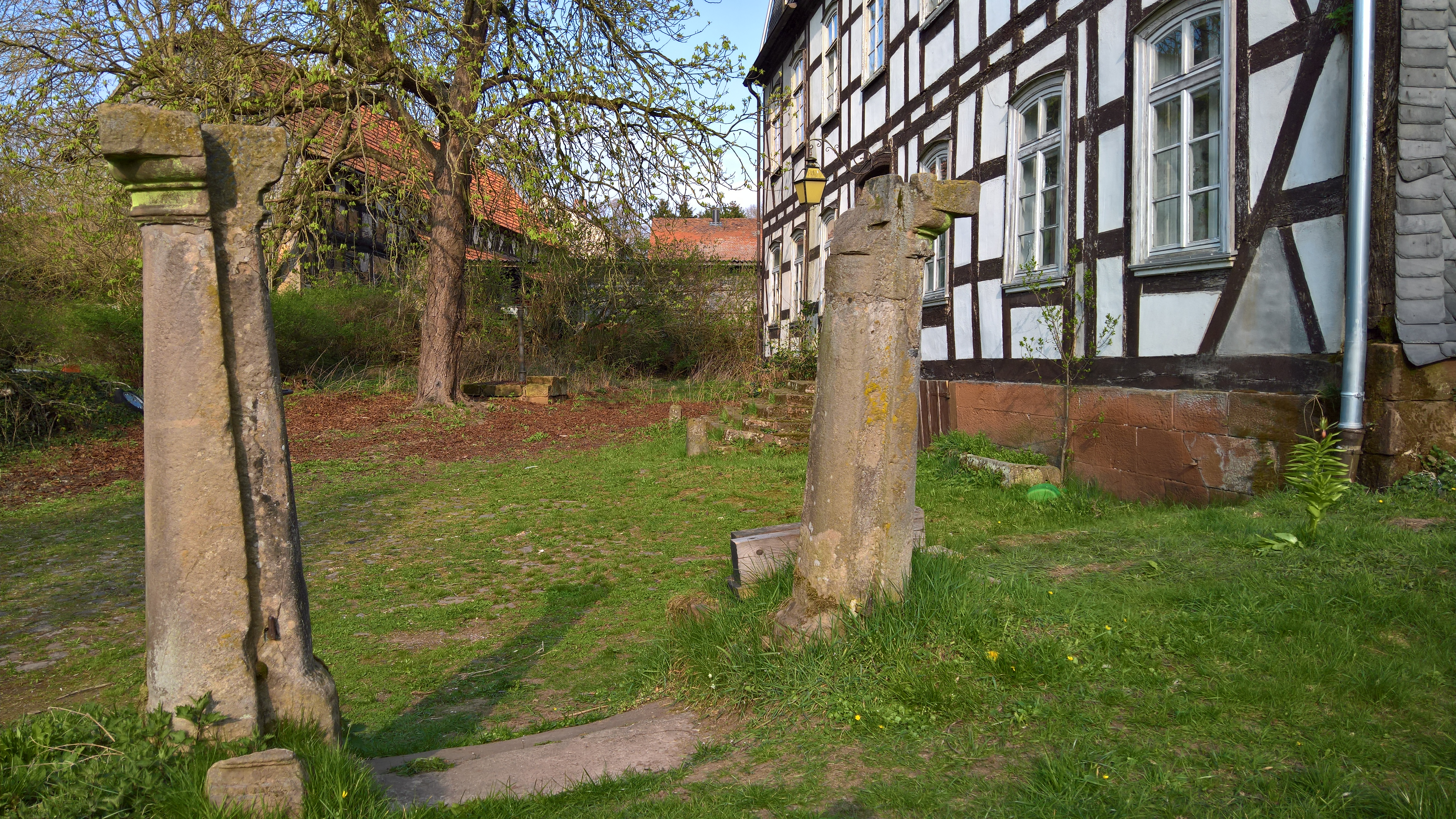 Säulen am Eingang zum Garten zum Lusthäuschen des Schlosses Amönau (Rapunzelturm)